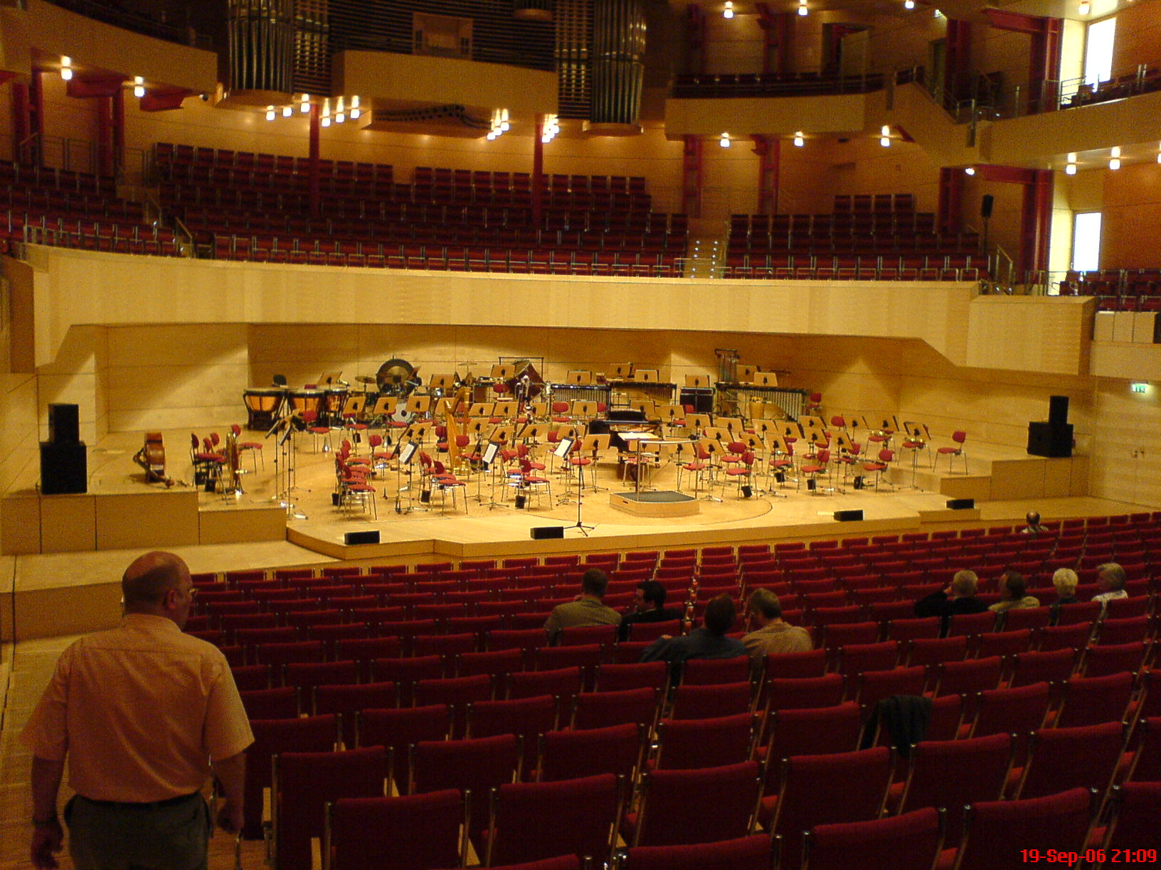 Saalbau Essen Bühne